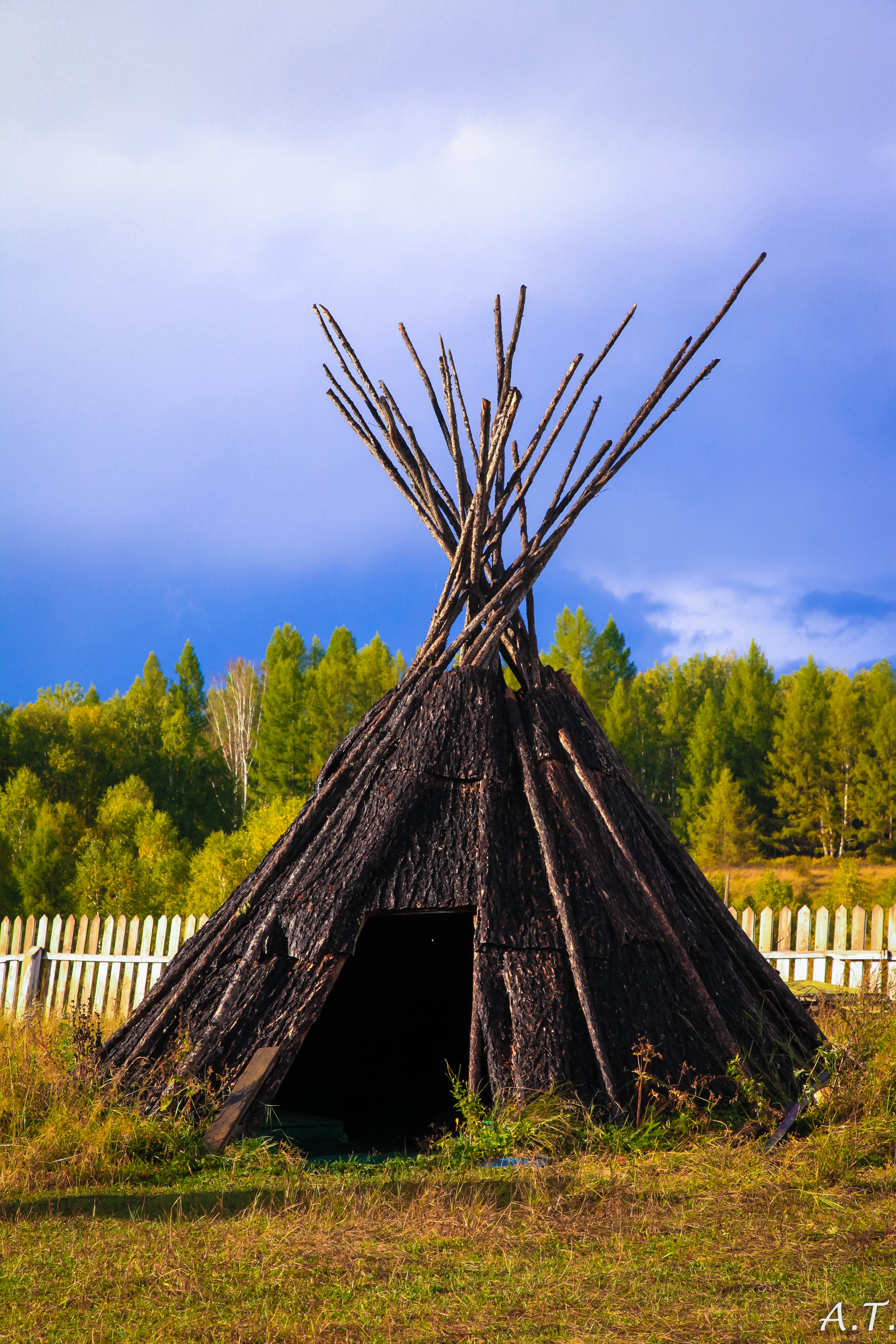 Чум жителей Тоджинского района РТ